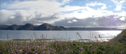 Три сестры у Кильдинского пролива